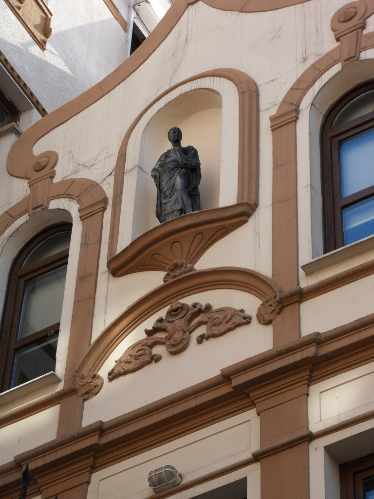 Yeldeğirmeni'nde bir bina.